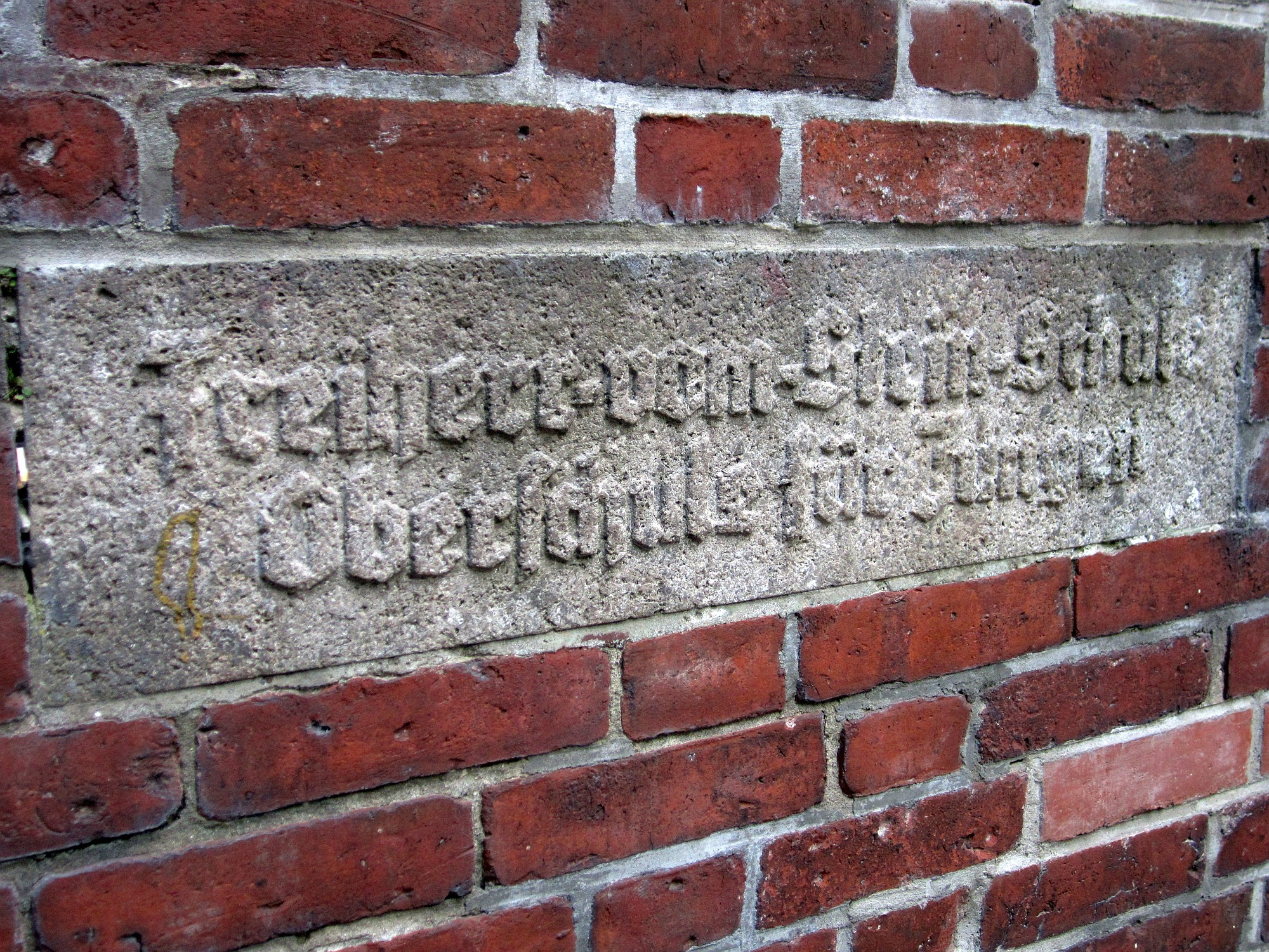 Steintafel am 1914 errichteten Eingang zum Erweiterungsbau in der damaligen Moltkestraße. Zustand Mai 2017.